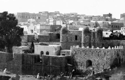 שער ירושלים בחומות יפו העתיקה ומאחוריו המצודה